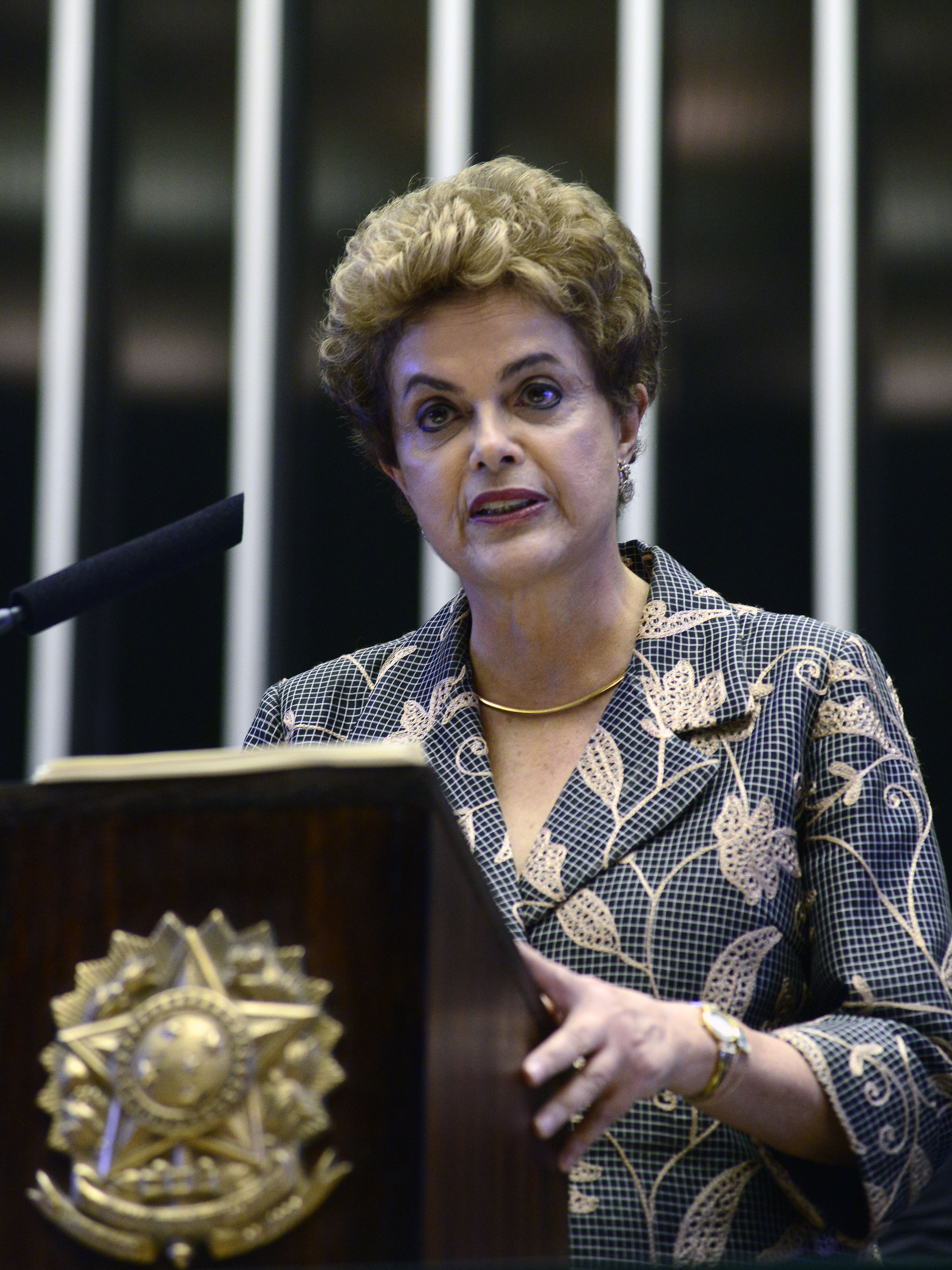 Dilma Rousseff lendo sua mensagem de 2016 ao Congresso Nacional.